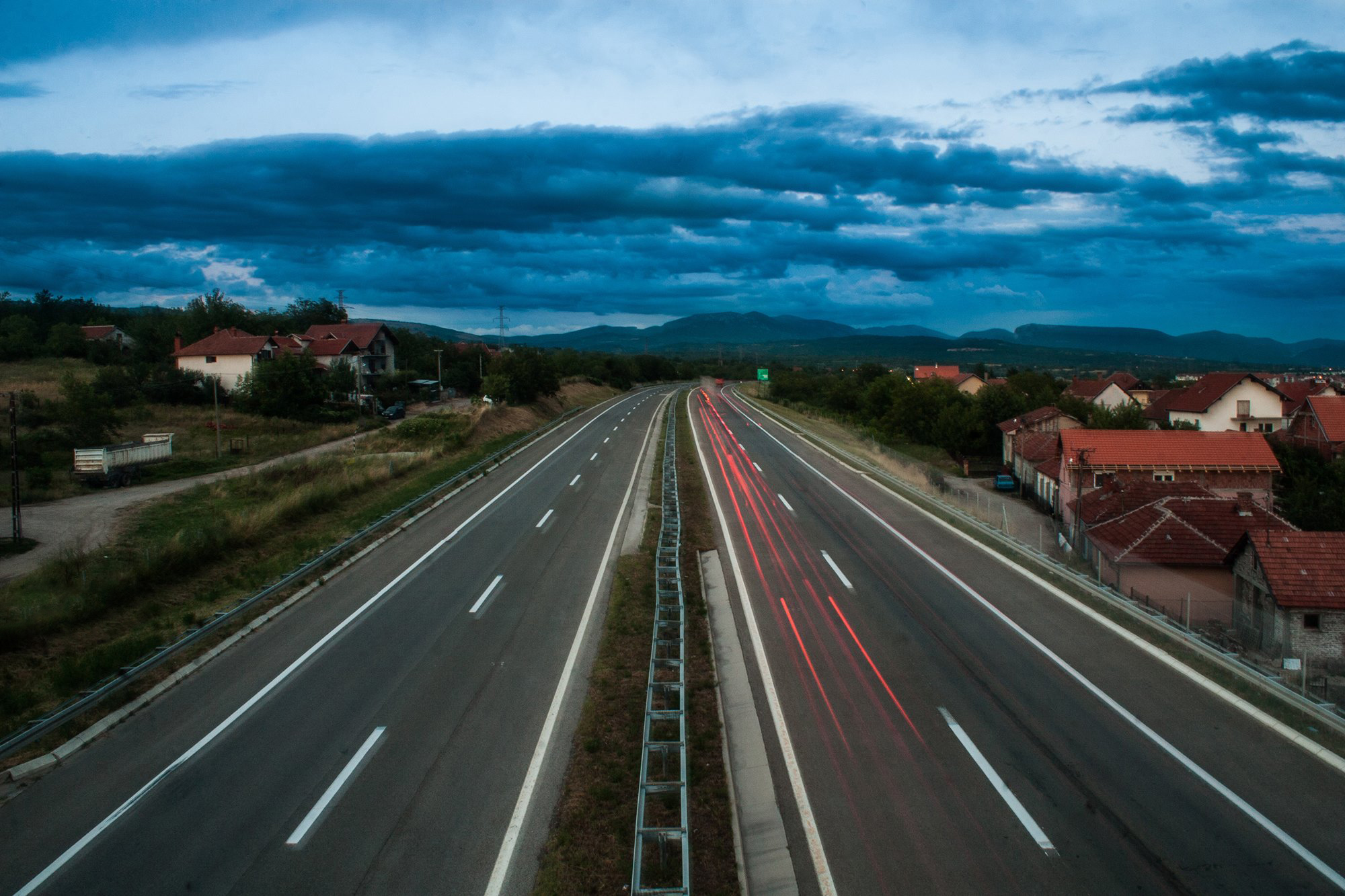 Аутопут Ниш - Београд, насеље Комрен